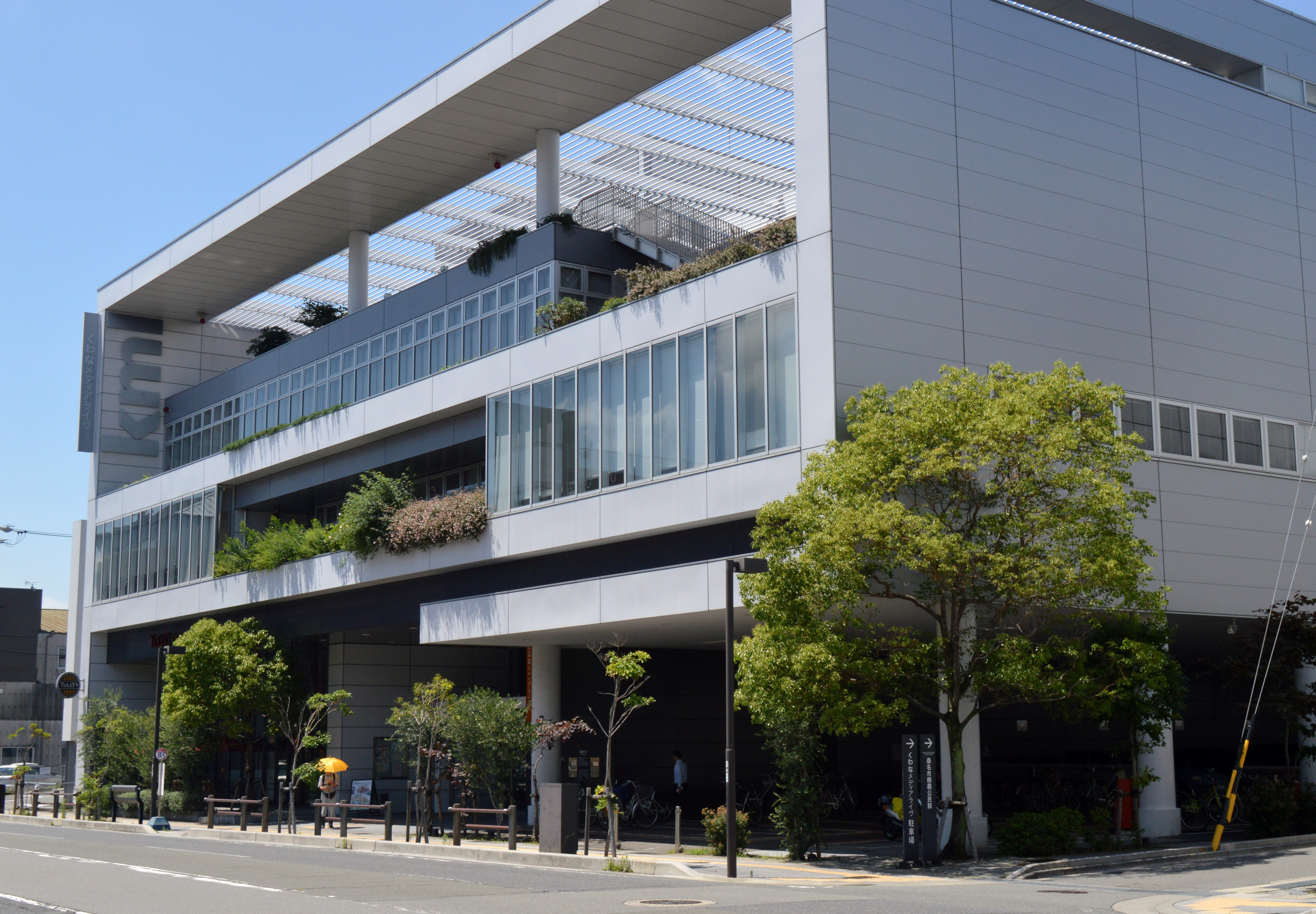 くわなメディアライブ。桑名市立中央図書館などを内包。